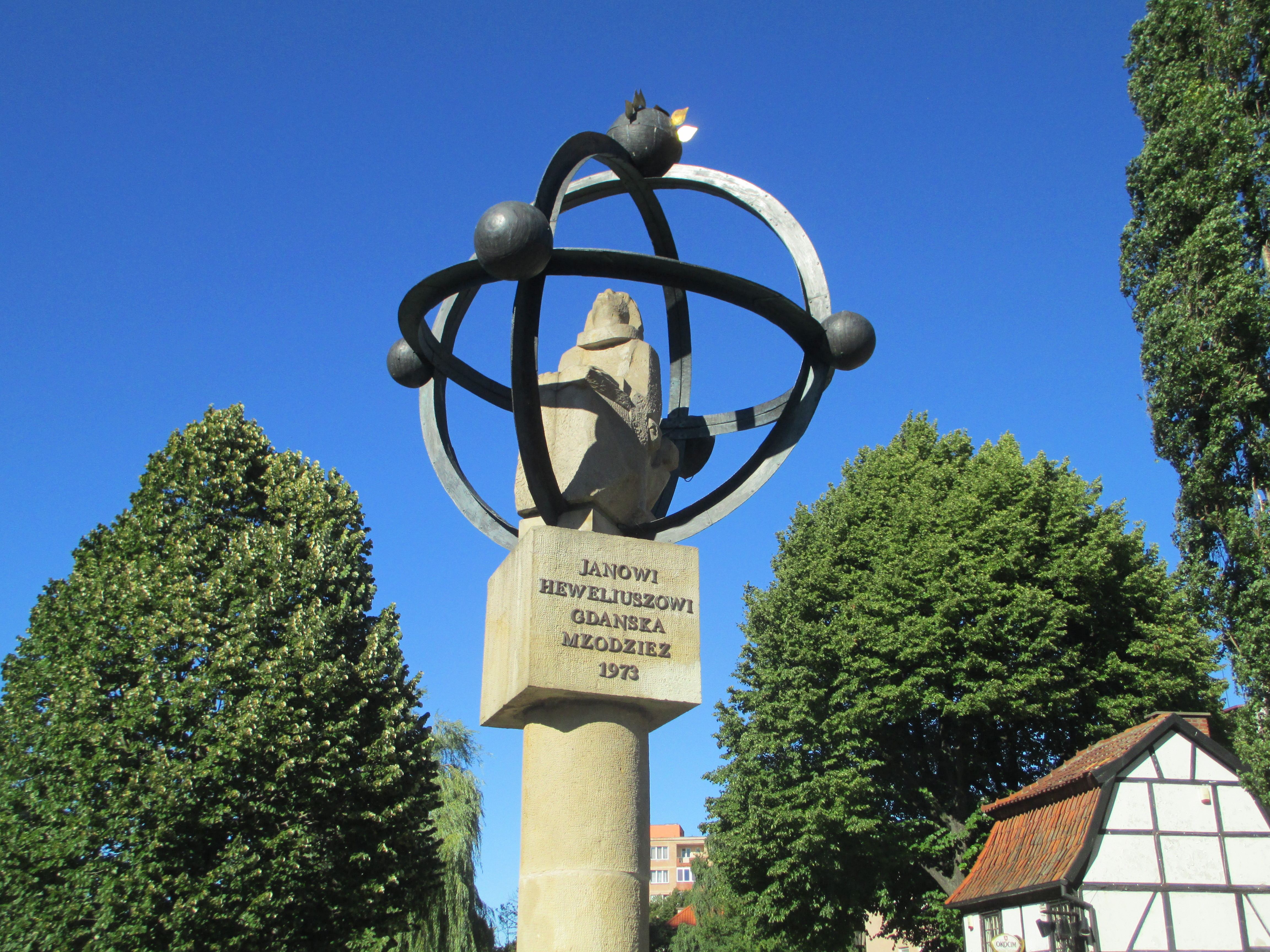 פסל של האסטרונום יוהנס הווליוס בגדנסק